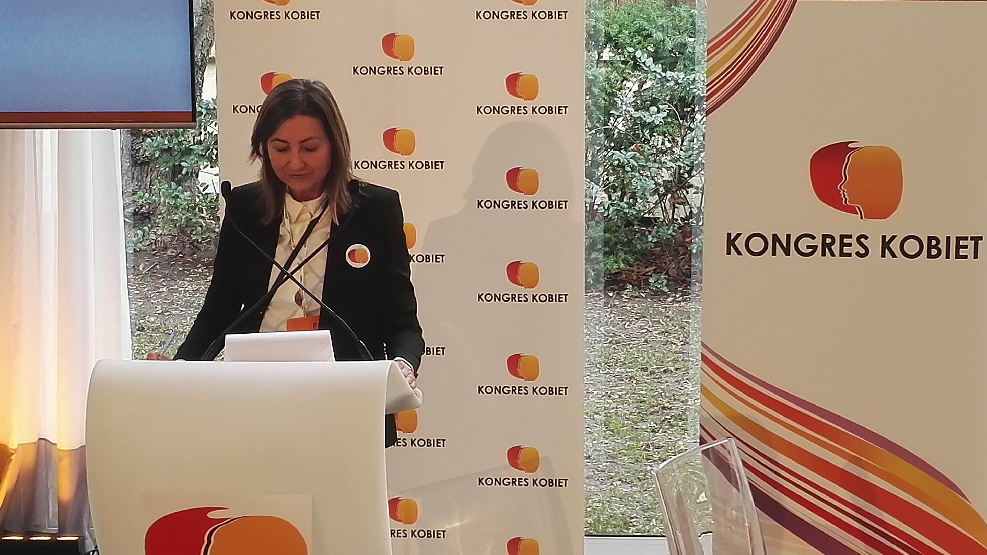 Prezeska Stowarzyszenia Kongres Kobiet, podczas Konferencji "Europa równych płac. Polska propozycja rozwiązań prawnych", 4 marca, 2020